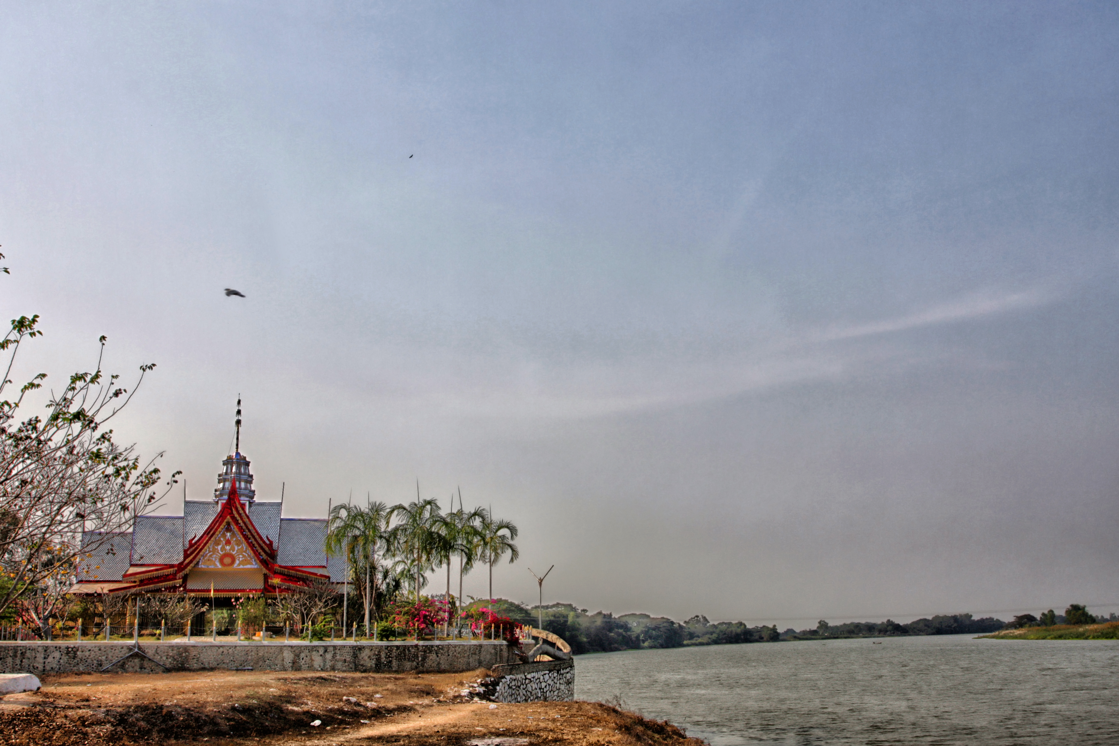 วัดปากคลองมะขามเฒ่า